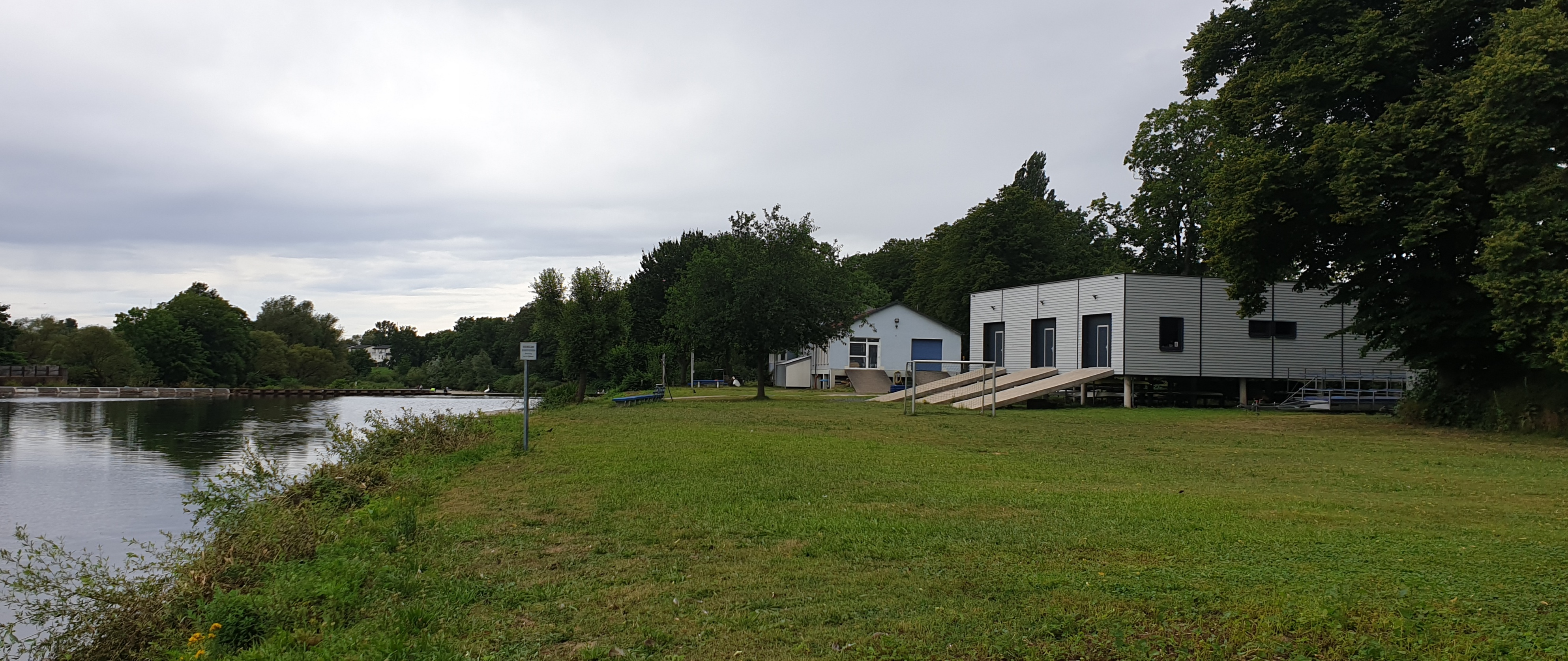 Bootshaus und Vereinsgelände des Siegburger Rudervereins 1910 e. V. am Ufer der Sieg, eines Nebenflusses des Rheins.